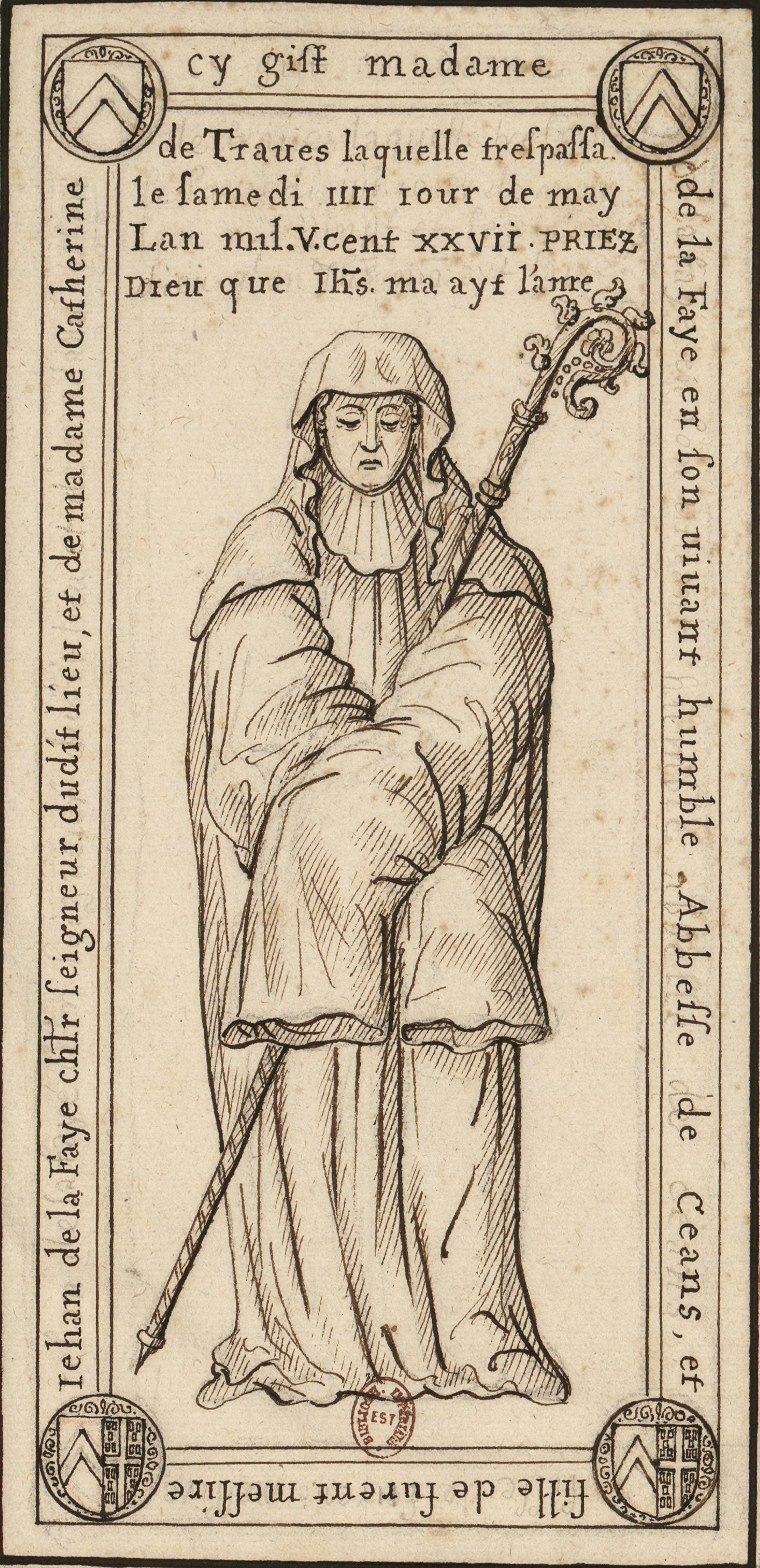 Pierre tombale sur laquelle est gravée l'effigie d'une abbesse